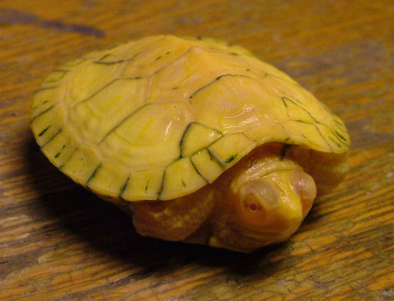 Trachemys scripta elegans albina, Roma Italia